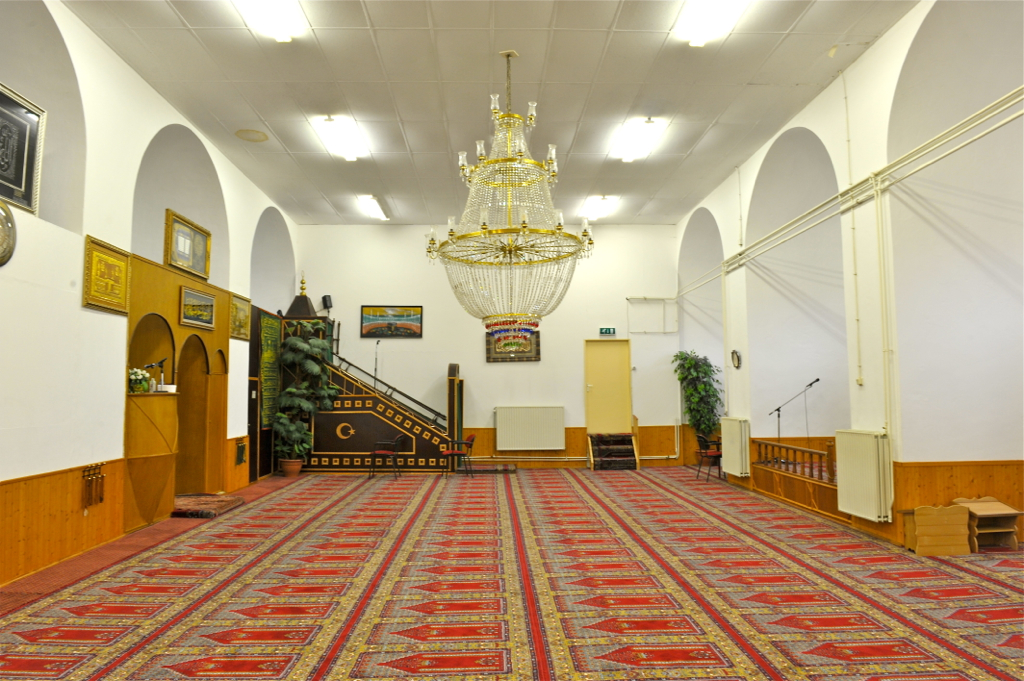 De moskee is gevestigd in de voormalige kapel van het klooster Concregatie H. Geest. Slechts een klein bord aan de koorzijde van de kapel verwijst naar de huidige functie van moskee, waarvan de ingang aan de achterzijde van de voormalige kapel is gelegen. Aan de oostelijke wand (links op de foto) kun je de volgende zaken zien: De Kursi, de plaats waar de imam op vrijdag praat met de gelovigen. De Mihrap, de gebedsnis in de richting van Mekka. De Mümber, de trappen waar de imam eveneens praat met de gelovigen.